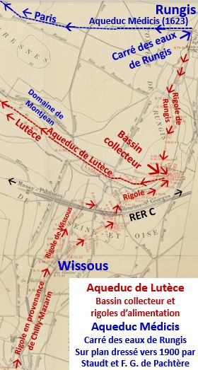 Aqueduc de Lutèce Bassin collecteur et rigoles d'alimentation